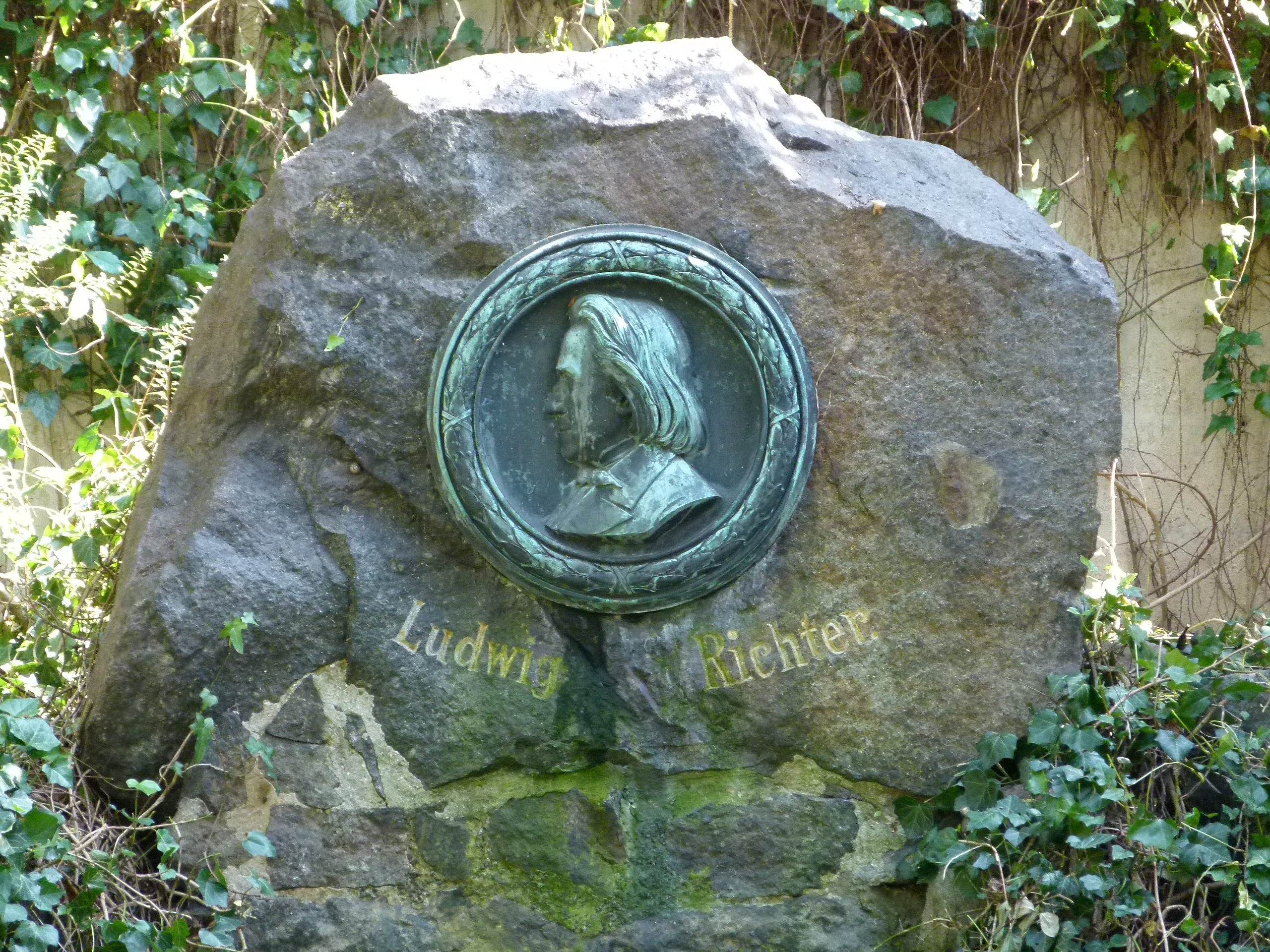 Ludwig-Richter-Denkmal im Garten des Leonhardi-Museums in Loschwitz, Grundstraße 26, Dresden. Emil August Eduard Leonhardi (* 19. Januar 1828 in Freiberg; † 15. Juli 1905 in Dresden-Loschwitz) war ein deutscher Landschaftsmaler und Sohn des schnell zu Wohlstand gekommenen Dresdner Tintenfabrikanten August Leonhardi (1805–1865). Er erwarb 1879 die ausgediente, ehemaligen Hentschelmühle („Rothe Amsel“) im Dresdner Stadtteil Loschwitz und baute sie u.a. zu einem Atelier um.